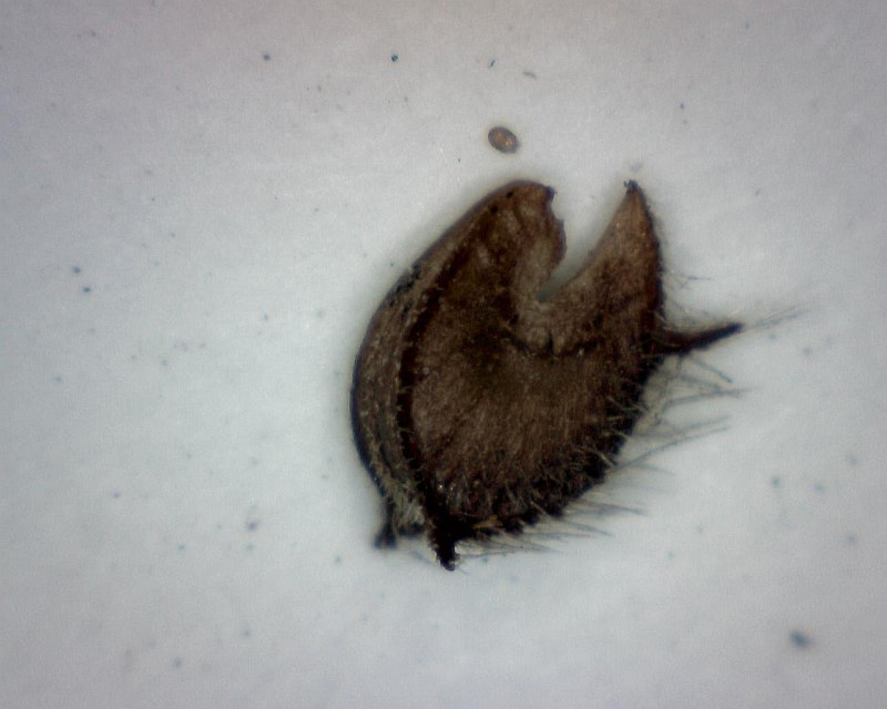 Семена Дамианы Turnera diffusa Seeds